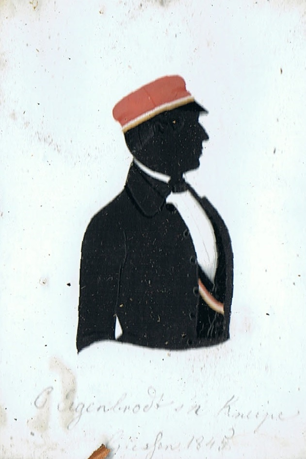 Scherenschnitt von Karl Eigenbrodt